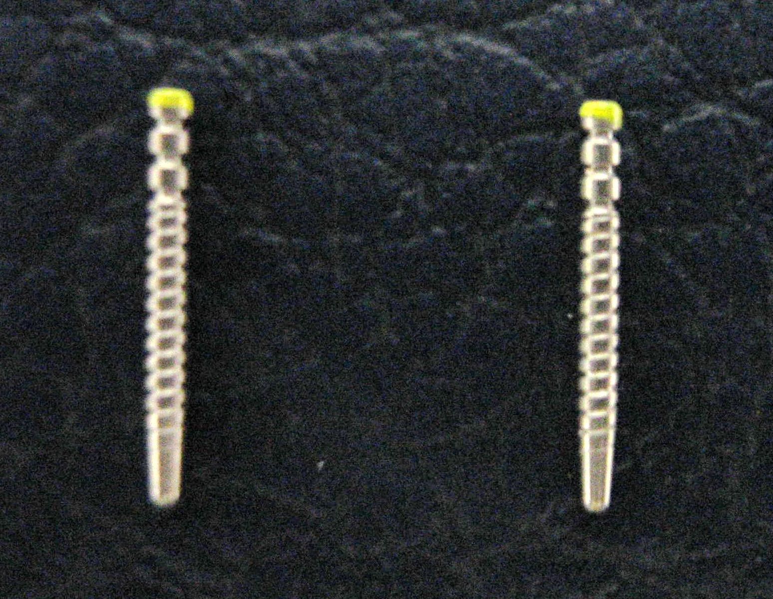 Nucleos prefabricados